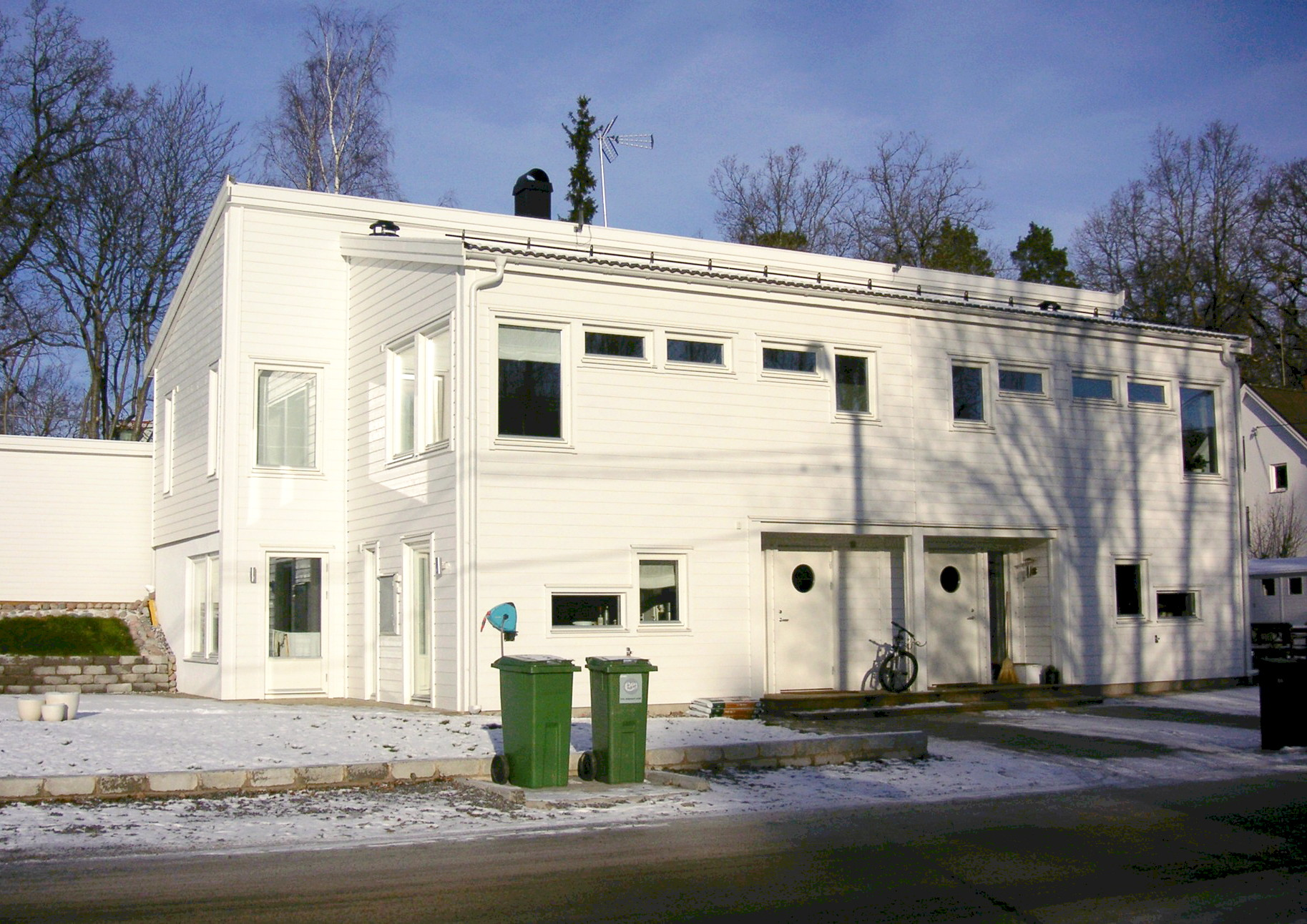 Exempel för ett parhus